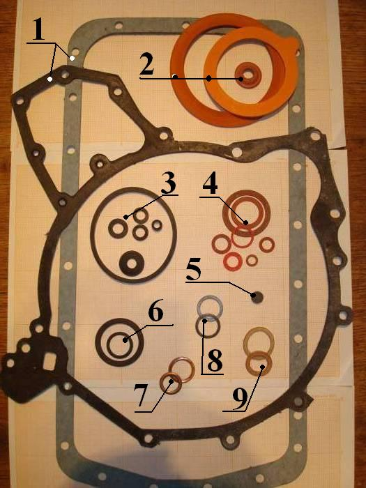 Photo de divers joints plats.